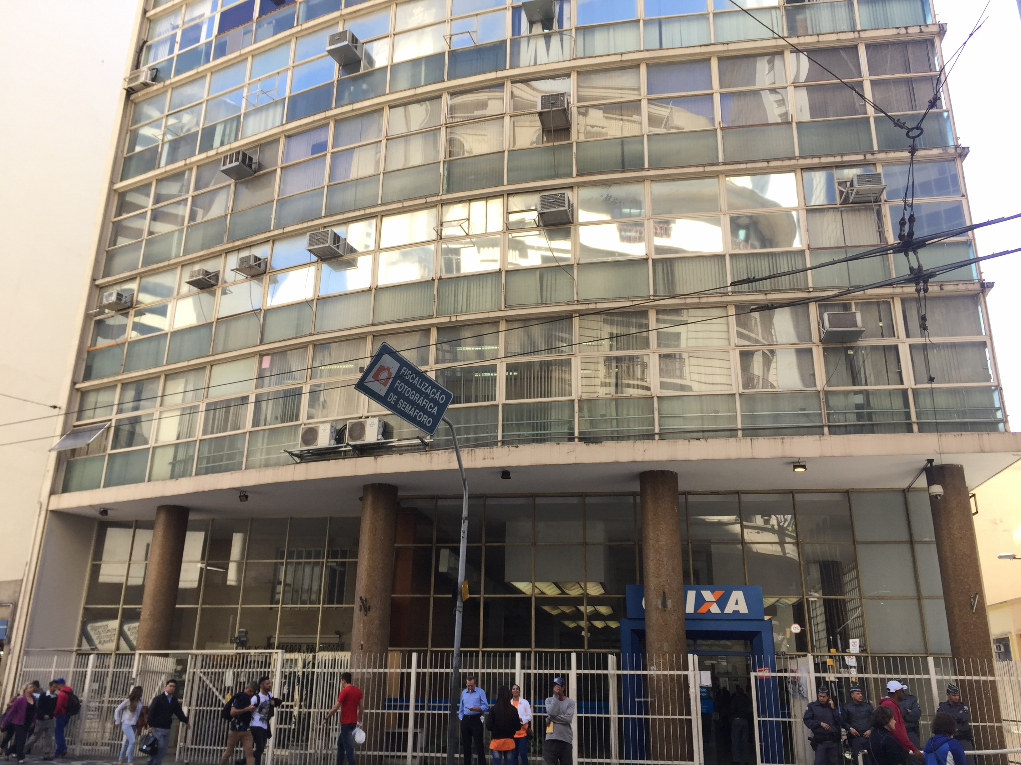 Fachada do Edifício Banco Paulista do Comércio, em São Paulo (SP), Brasil